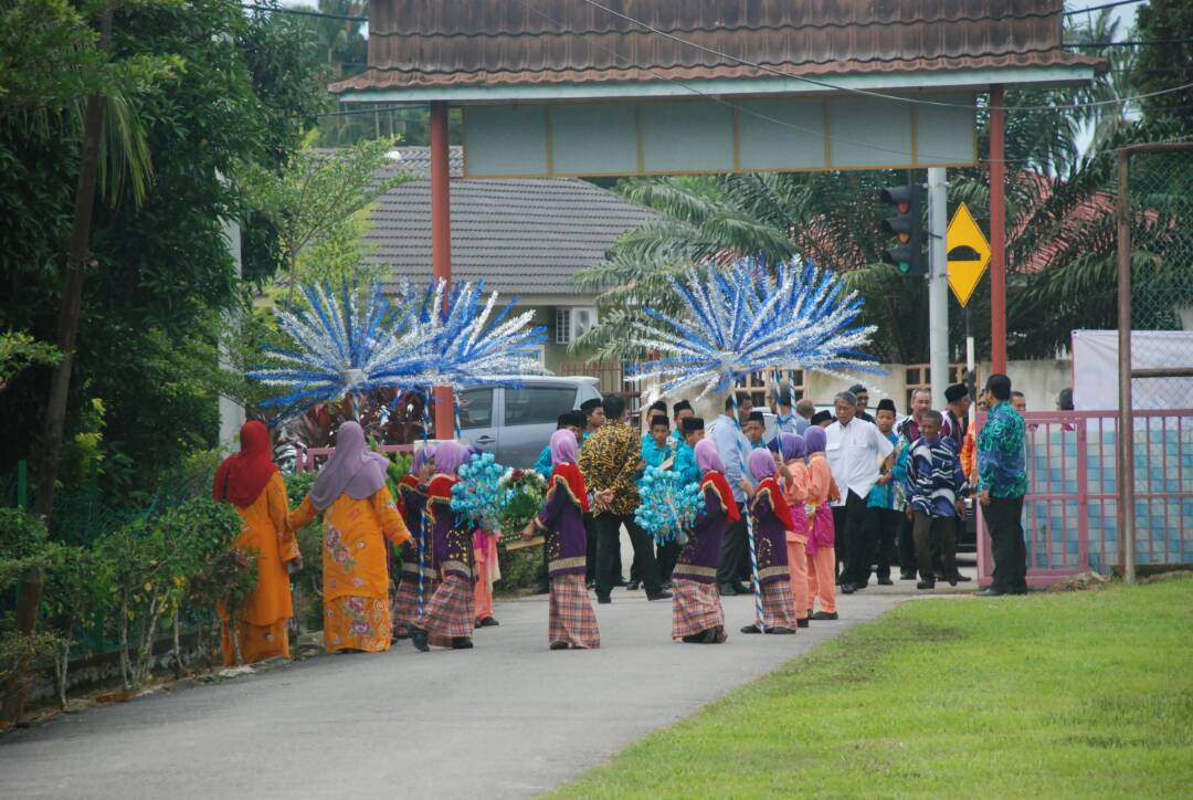 Ketibaan YB Datuk Hasan Bin Abdul Rahman EXCO Pertanian & Pembangunan Usahawan Melaka dan tetamu kehormat